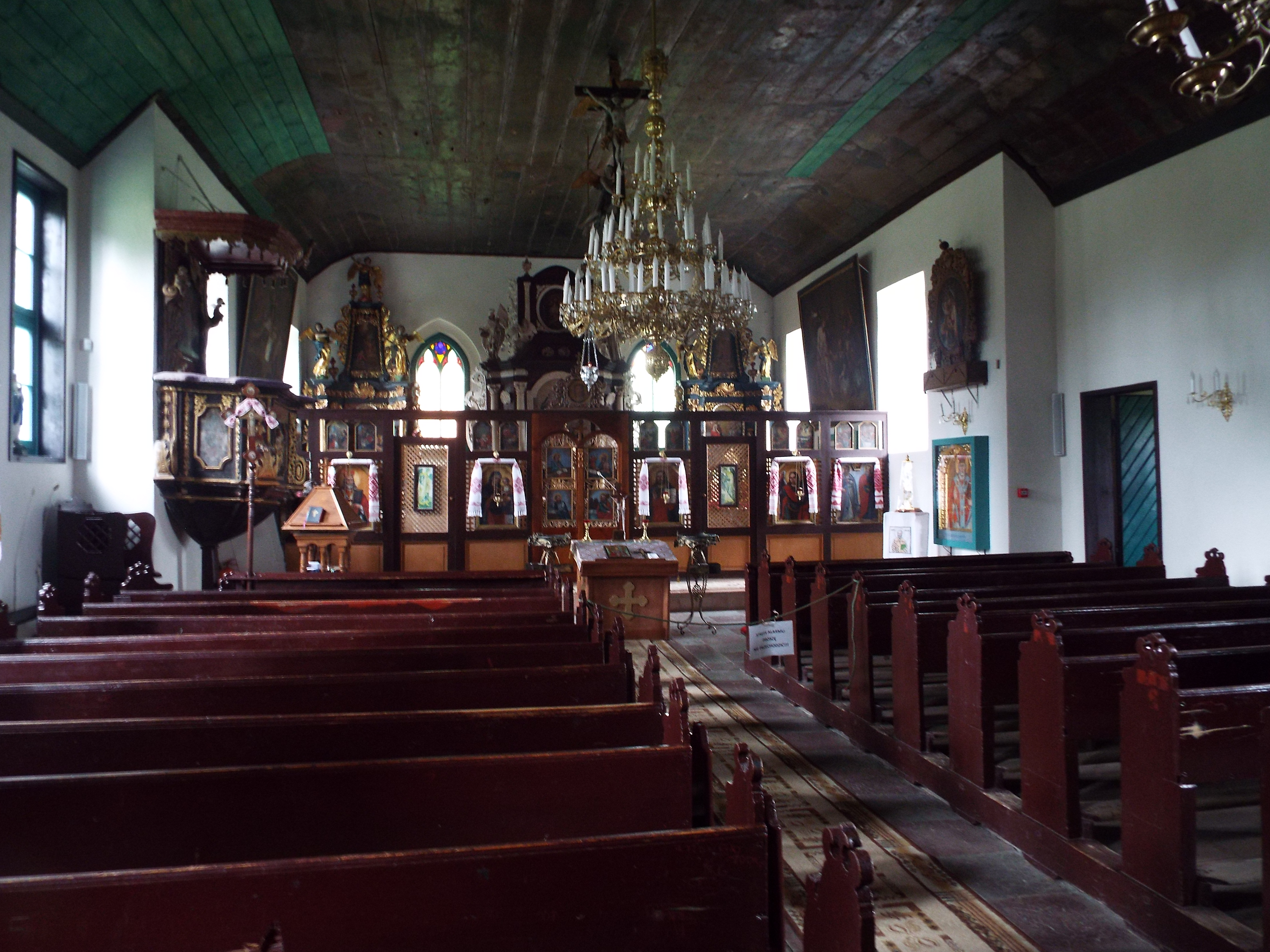 Cyganek - pierwotnie kościół rzymskokatolicki, obecnie greckokatolicka cerkiew parafialna, 1352, 1637-1674